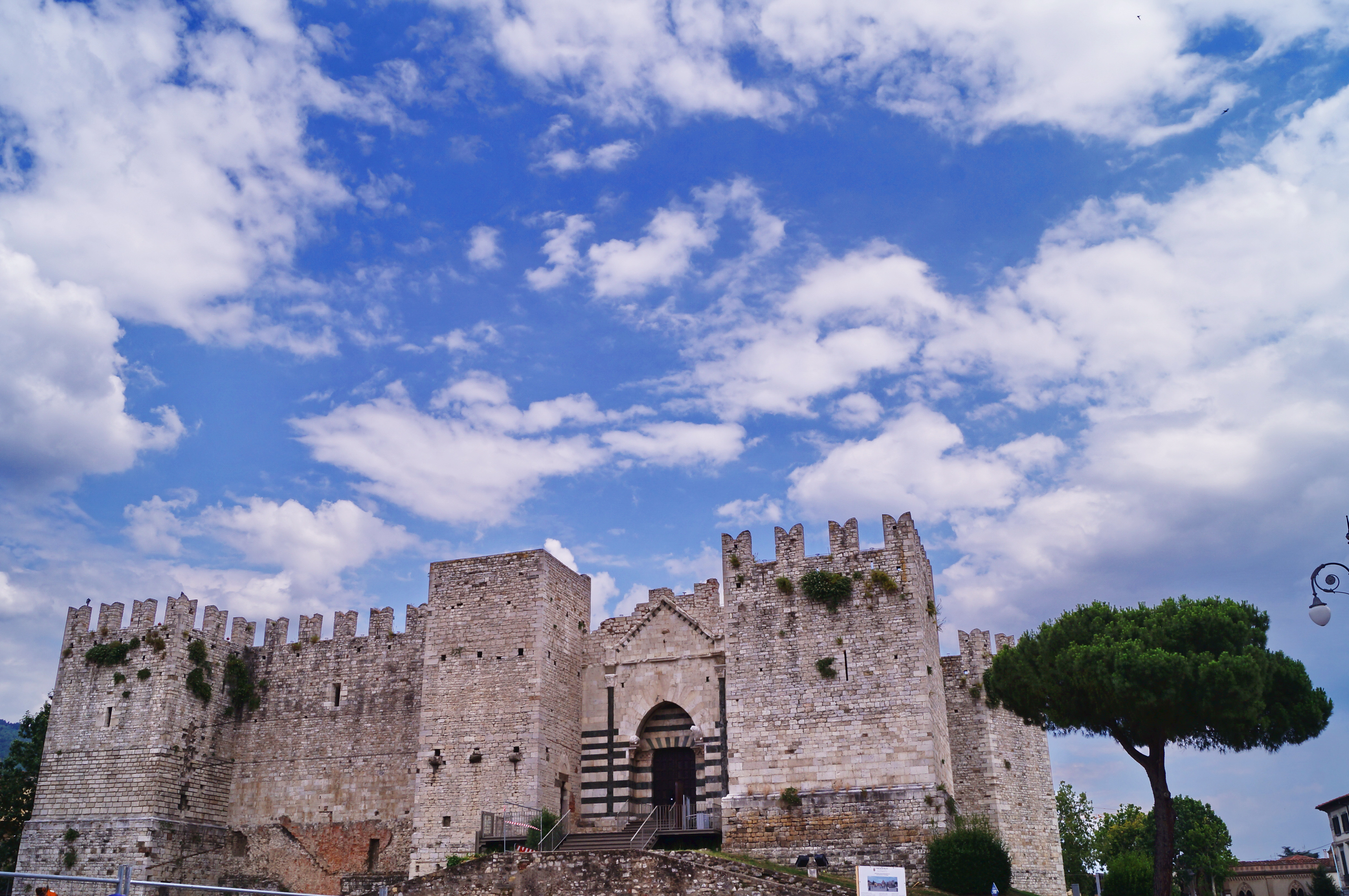 Castello dell'Imperatore, Prato, Toscana, Italia This is a photo of a monument which is part of cultural heritage of Italy.